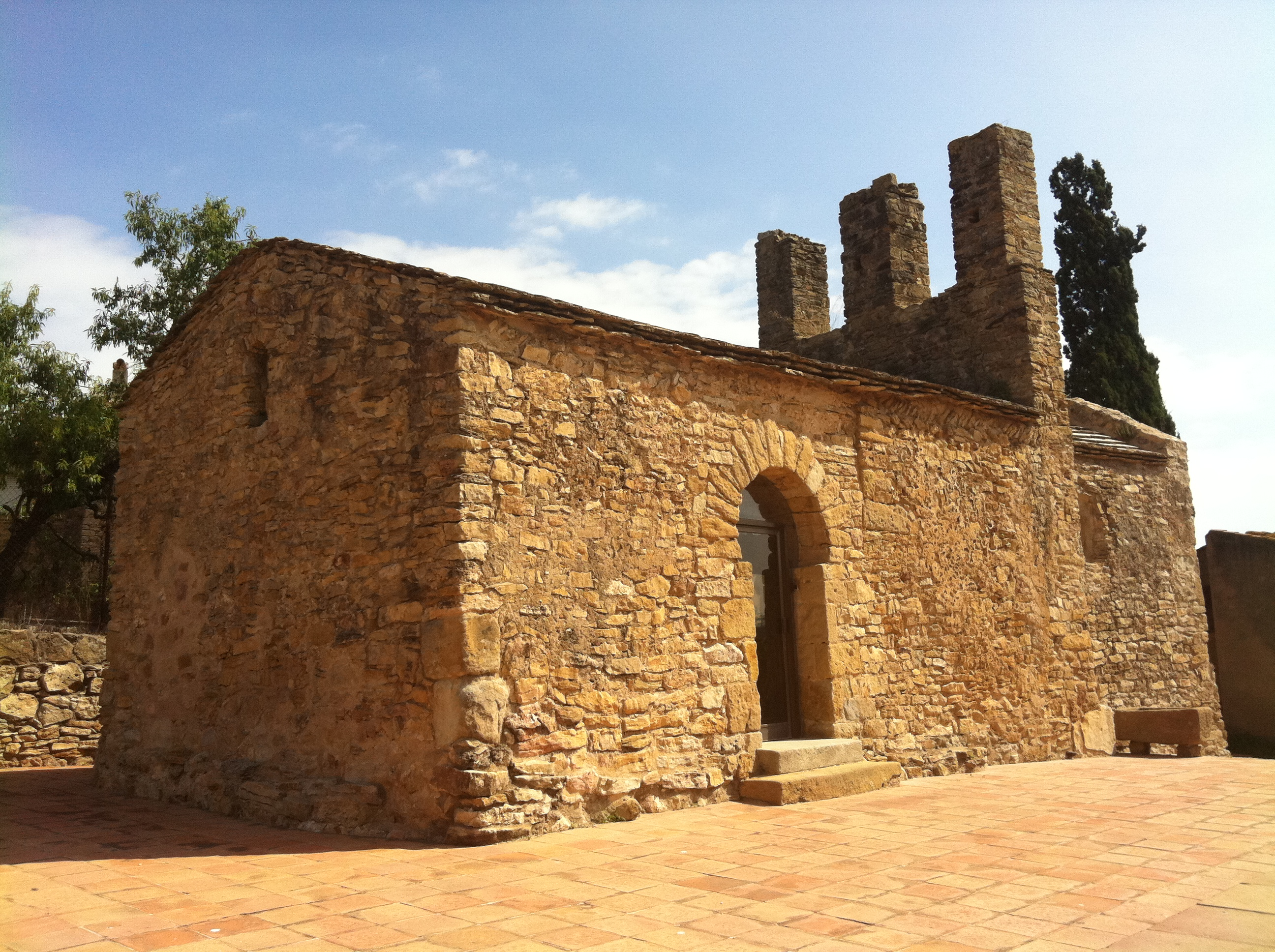 Esglesia de Sant Julià de Boada